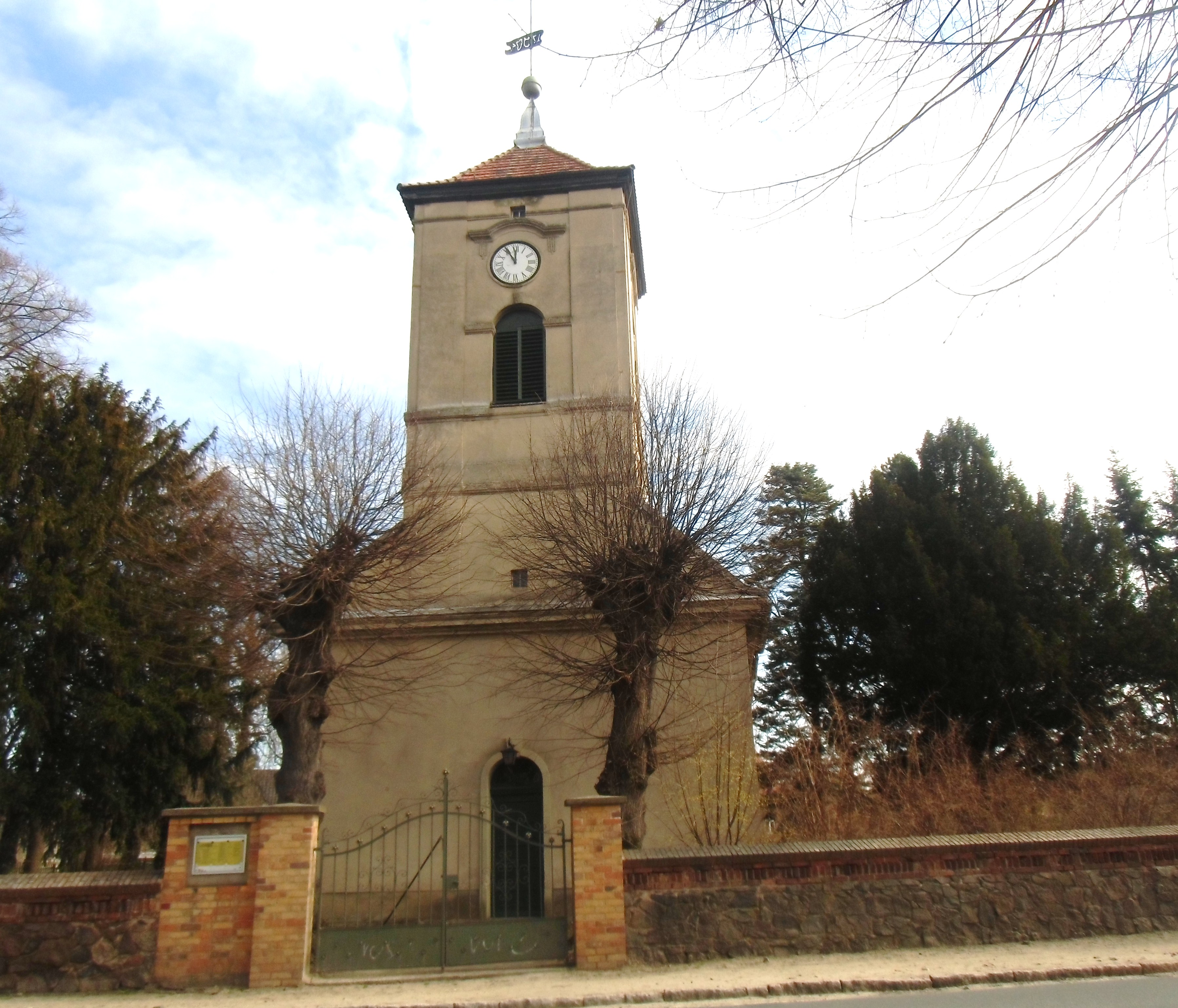 Denkmalgeschützte Dorfkirche von Fahrland, Ketziner Straße, erbaut 1709